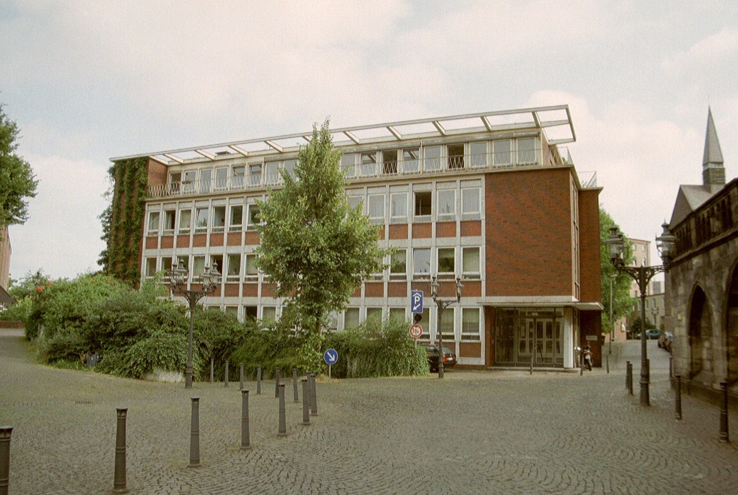 Stadtkämmerei Duisburg, Alter Markt 23, 47051 Duisburg